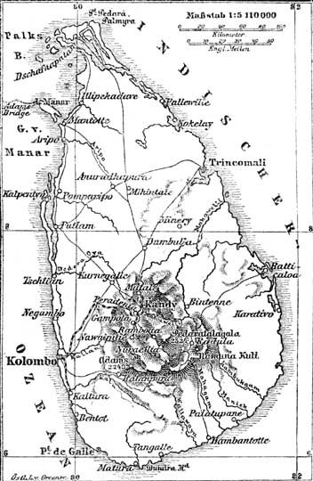 Map of Sri Lanka